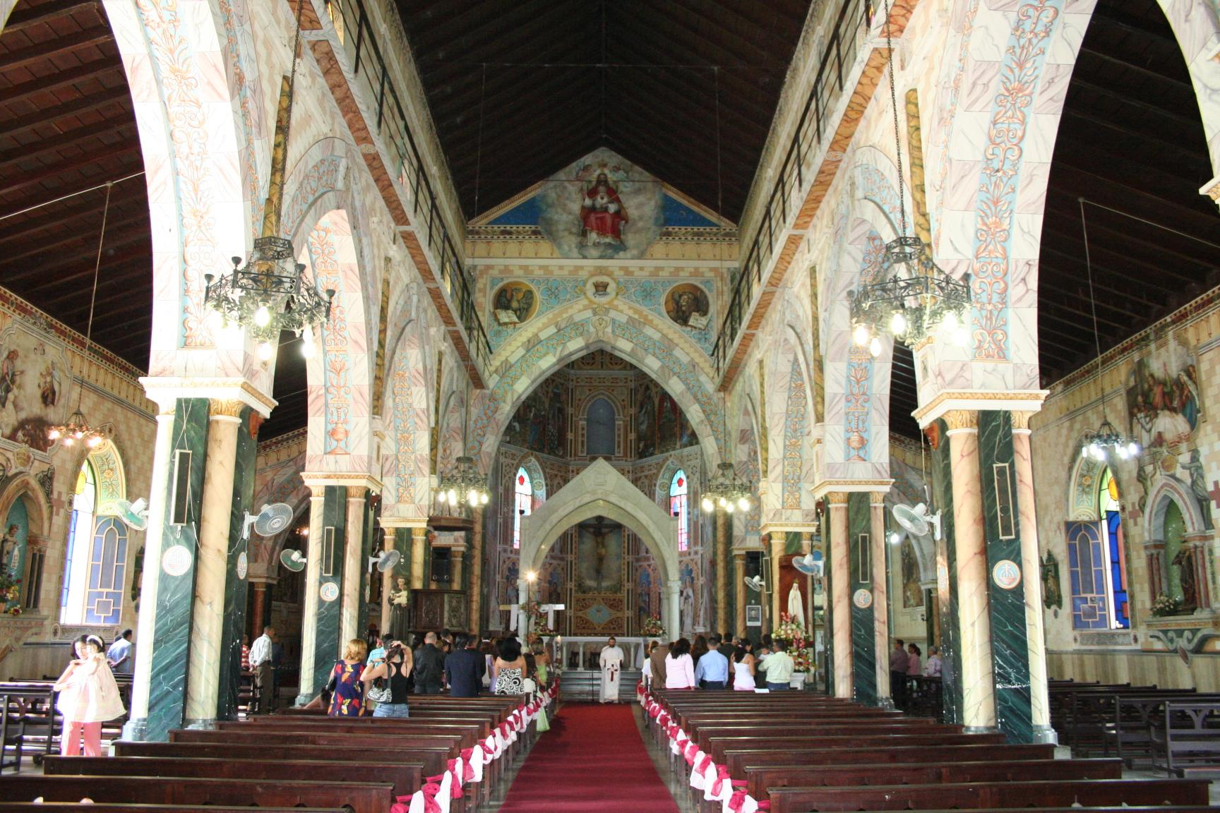 Iglesia Católica de Tinaquillo, estado Cojedes, Venezuela